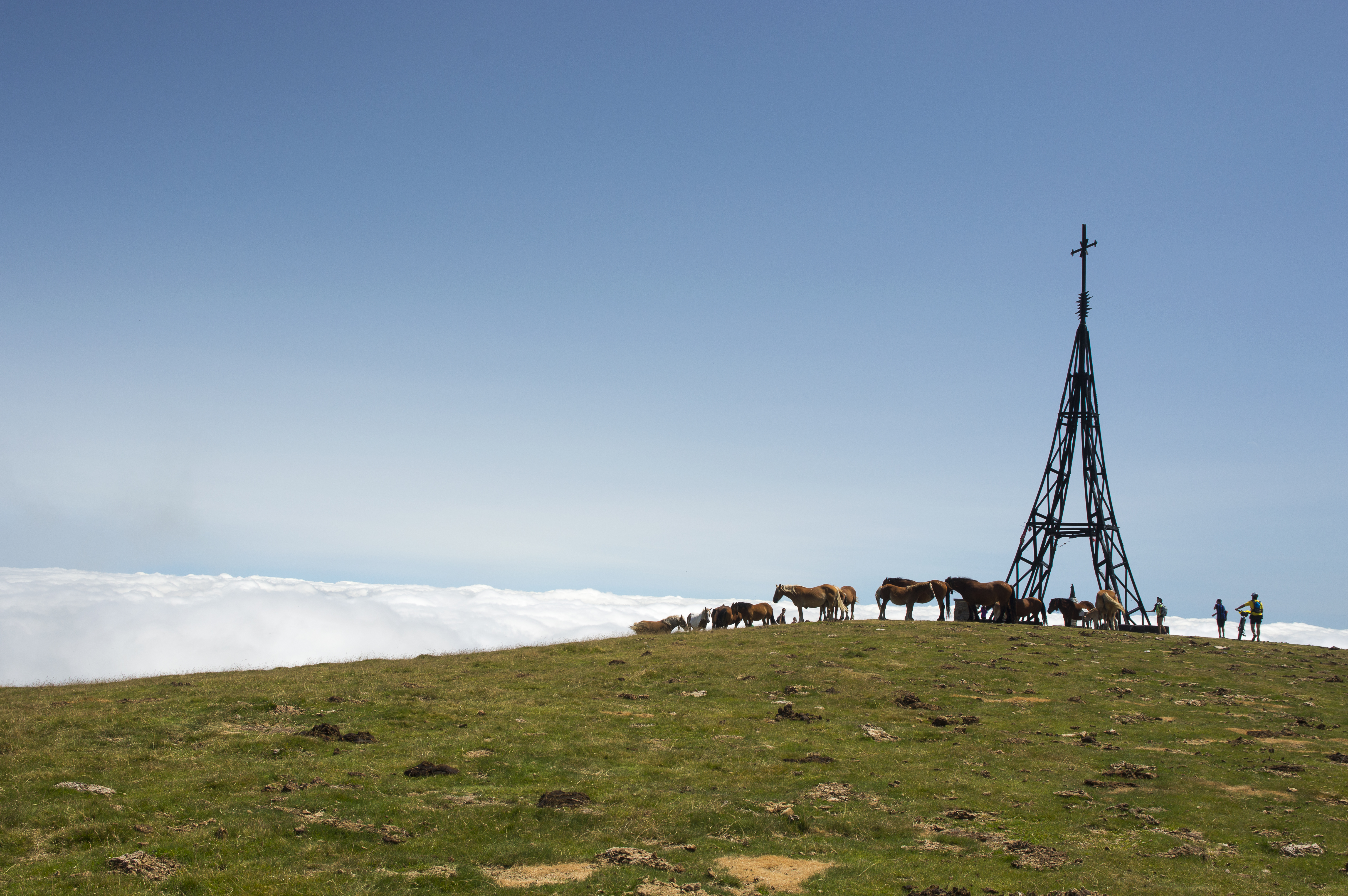 Gorbeia en la cruz de Gorbea This is a photography of a Site of Community Importance in Spain with the ID: ES2110009. Natura2000 entry, EEA entry